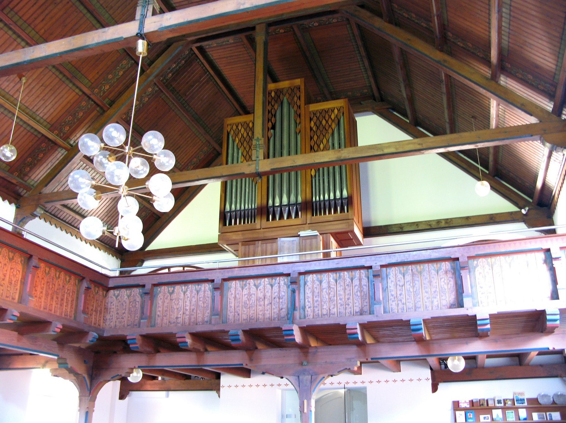 Orgel in Ihlowerfehn, Landkreis Aurich